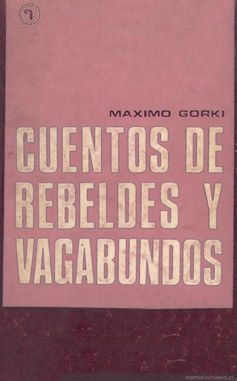 Portada del libro "Cuentos de rebeldes y vagabundos" de Maksim Gorky. Publicada en Chile por Editorial Quimantú. Prólogo de Volodia Teitelboim Colección "Quimantú para todos".